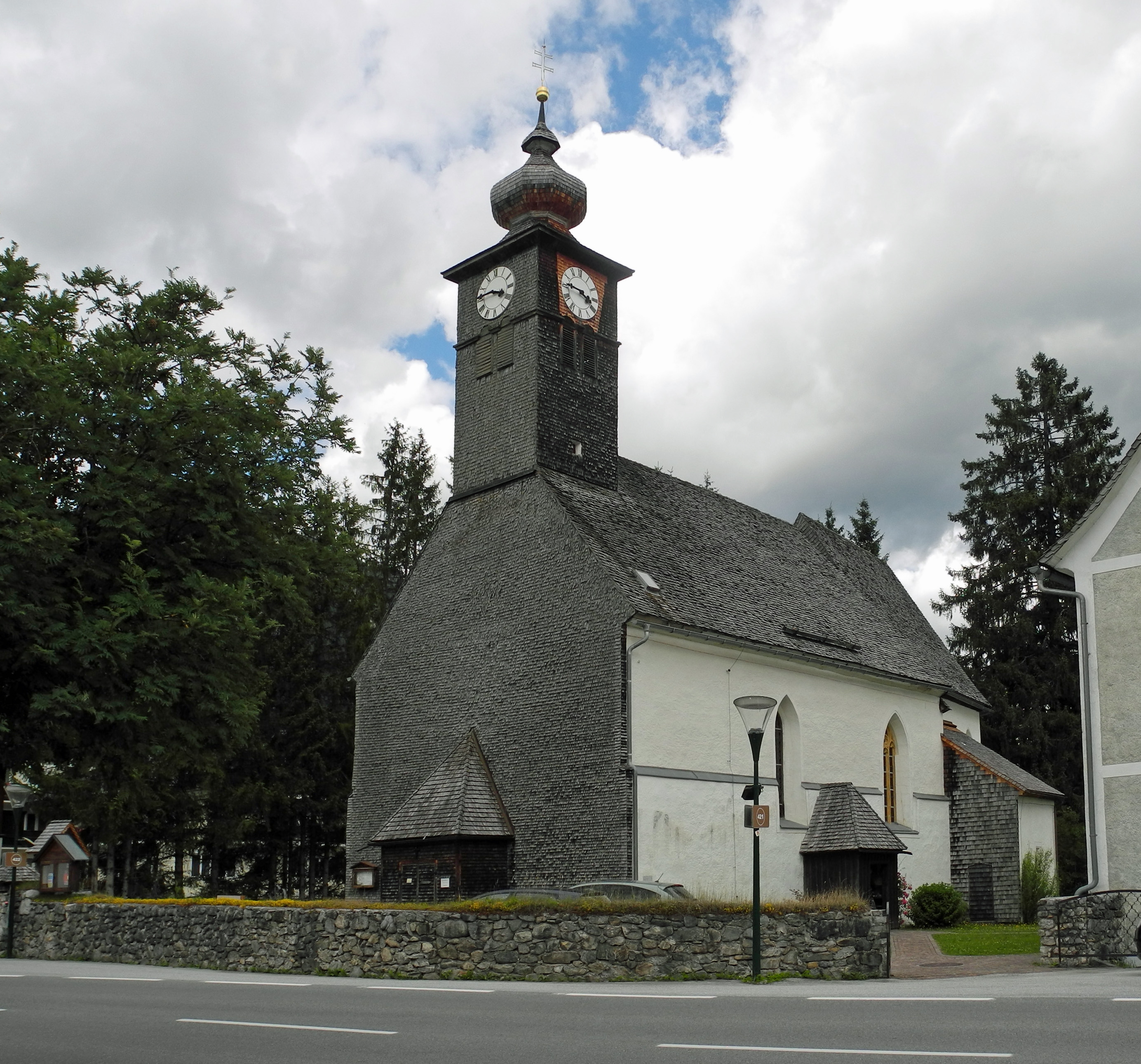 Kathol. Pfarrkirche St. Rupert in Ramsau-Kulm